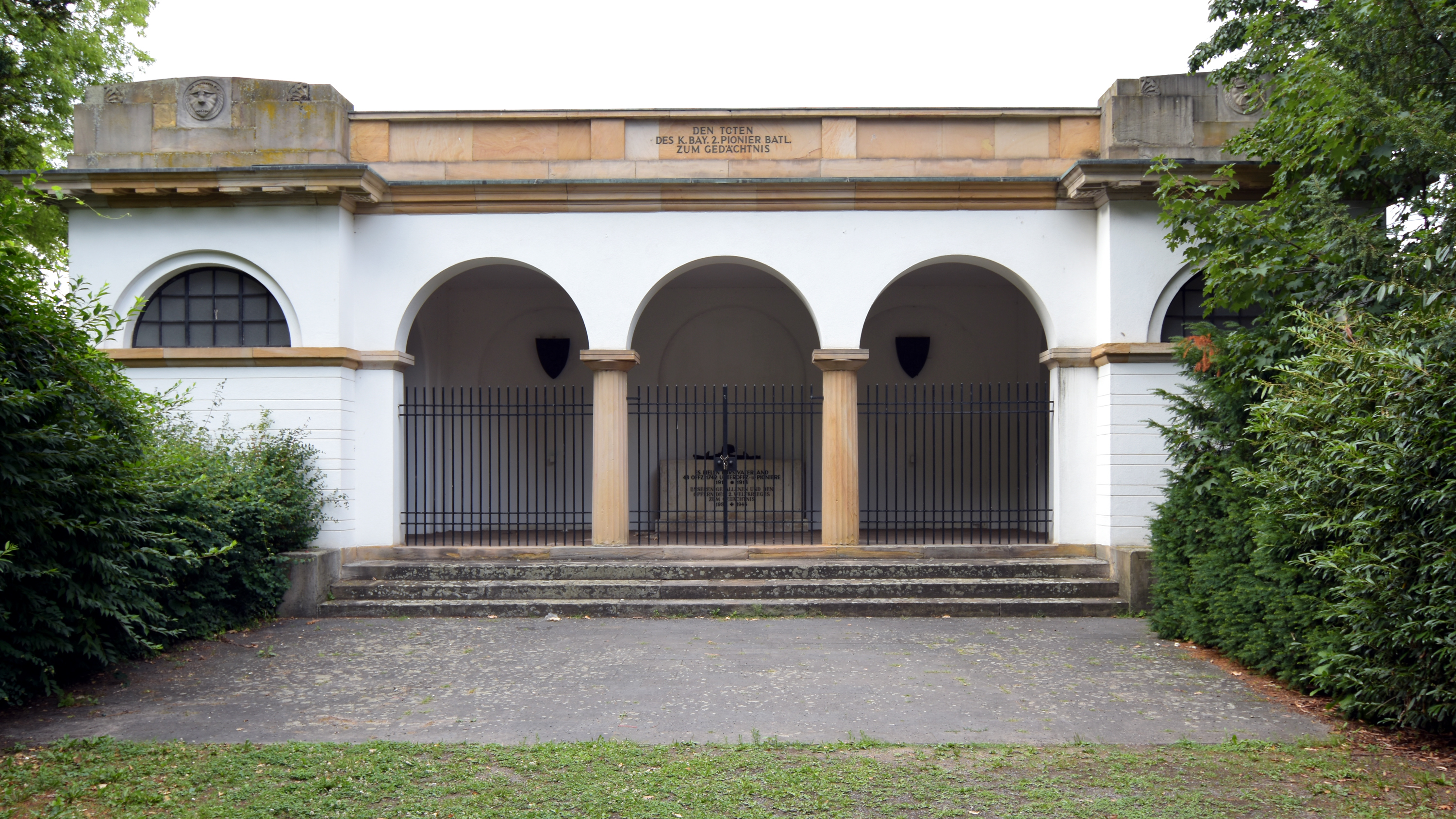 Speyer, Antikenhalle beim Dom